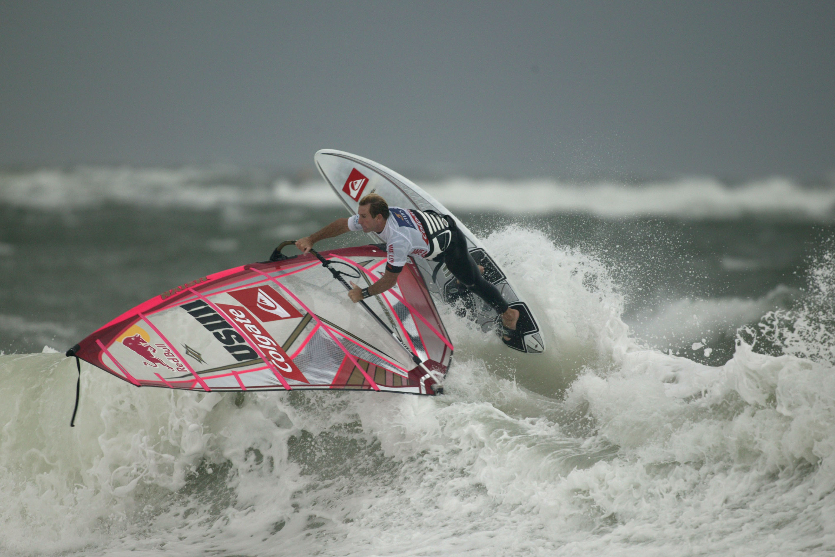 Robby Naish beim CWCS